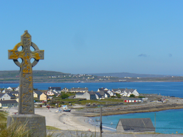 Aran Island. Summer 2006